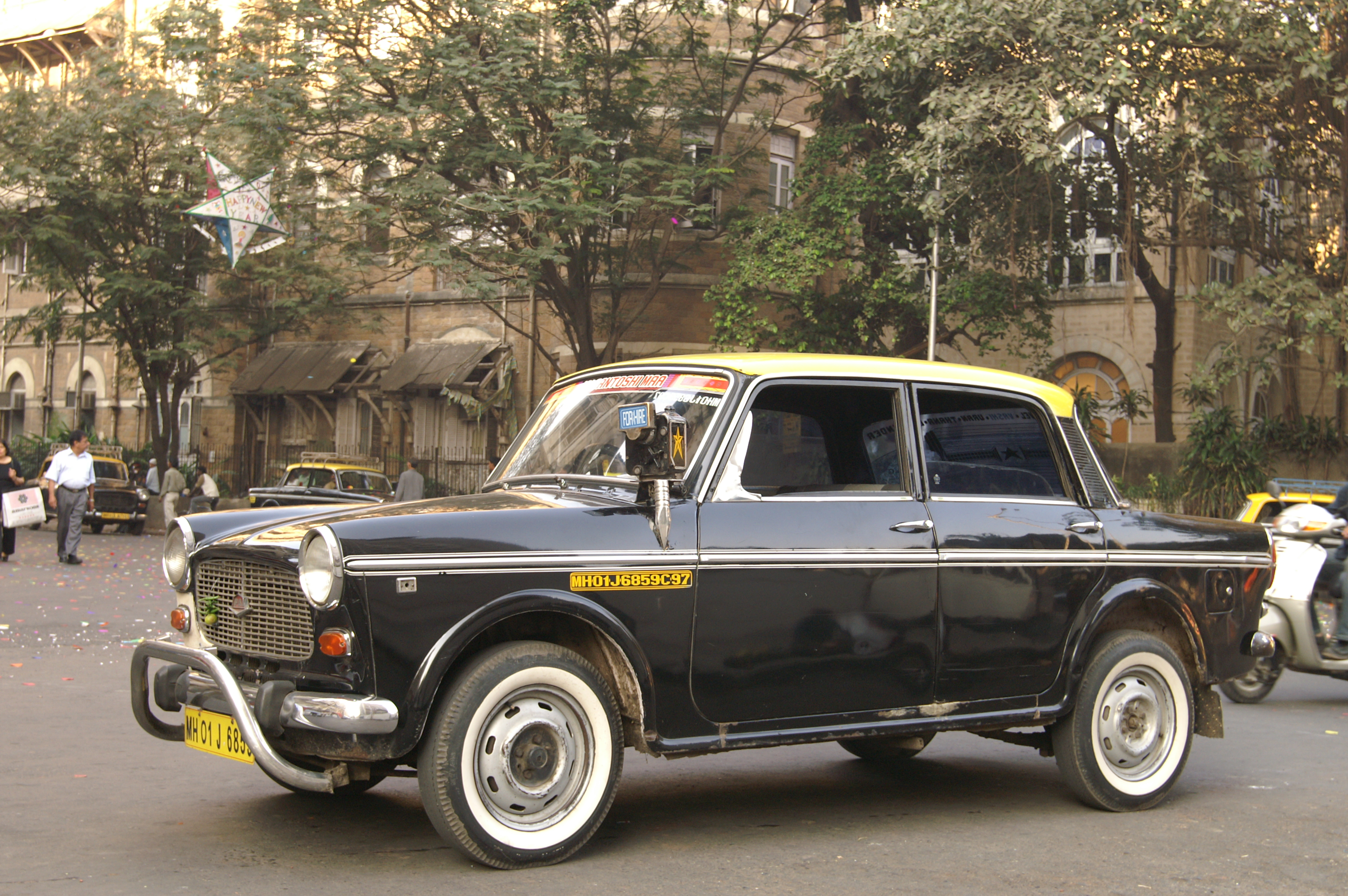 Mumbai taxi automobile.